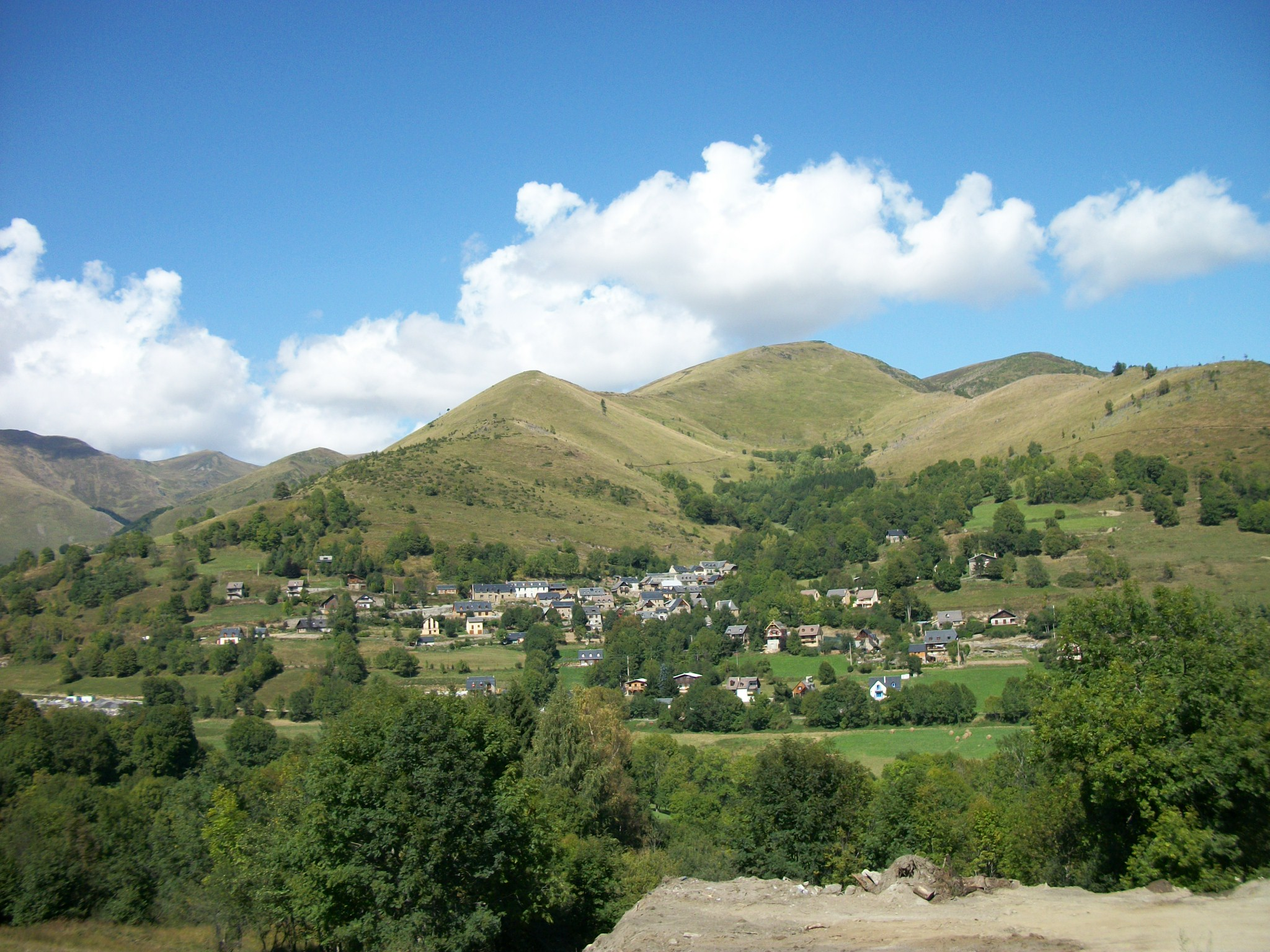 Village de Poubeau